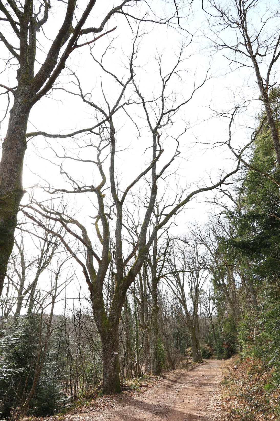 Suivre le chemin forestier sur 50 metres.